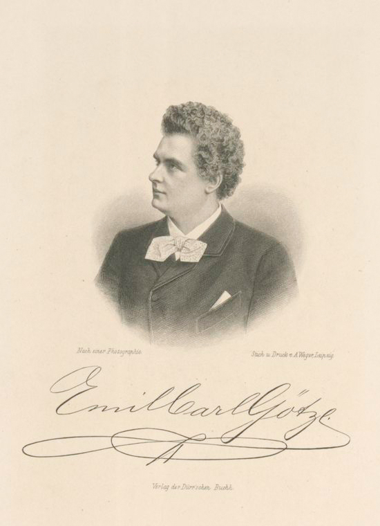 Der deutsche Opernsänger (Tenor) Emil Karl Goetze (1856-1901).